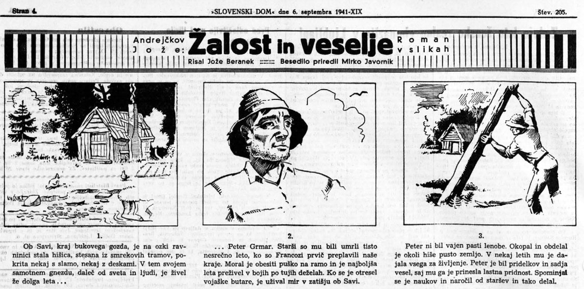 Začetek slikanice Žalost in veselje Jožeta Beranka v časopisu Slovenski dom 1941